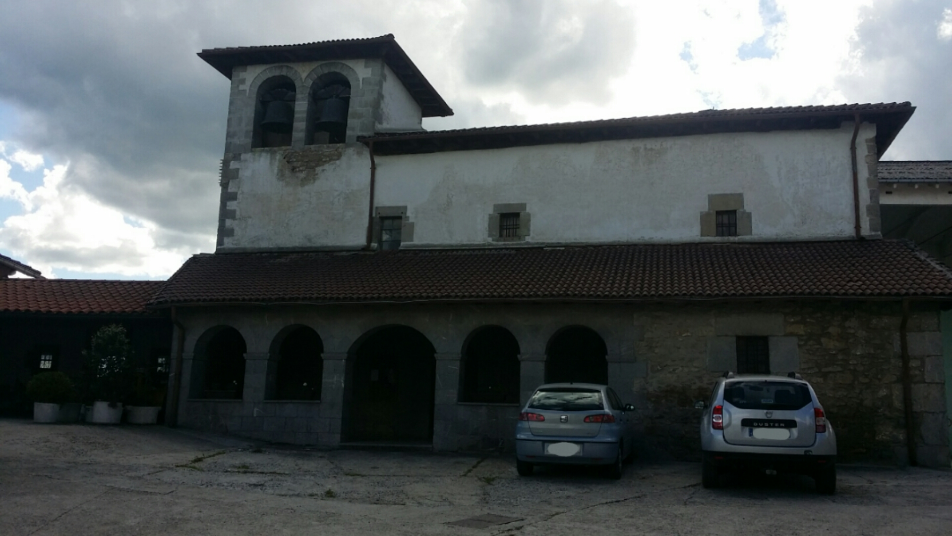 Igoako eliza